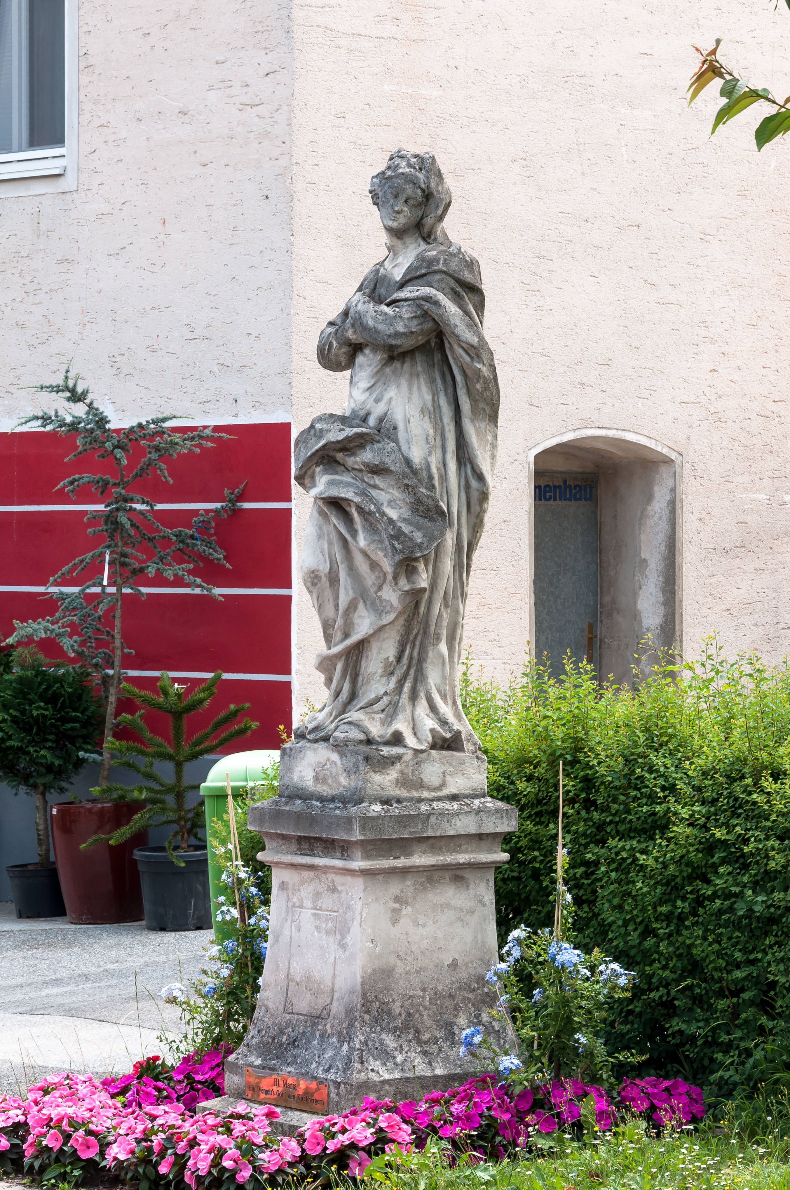 Die Statue der hl. Maria in der Figurenallee zur Pfarrkirche in Maria Lankowitz.